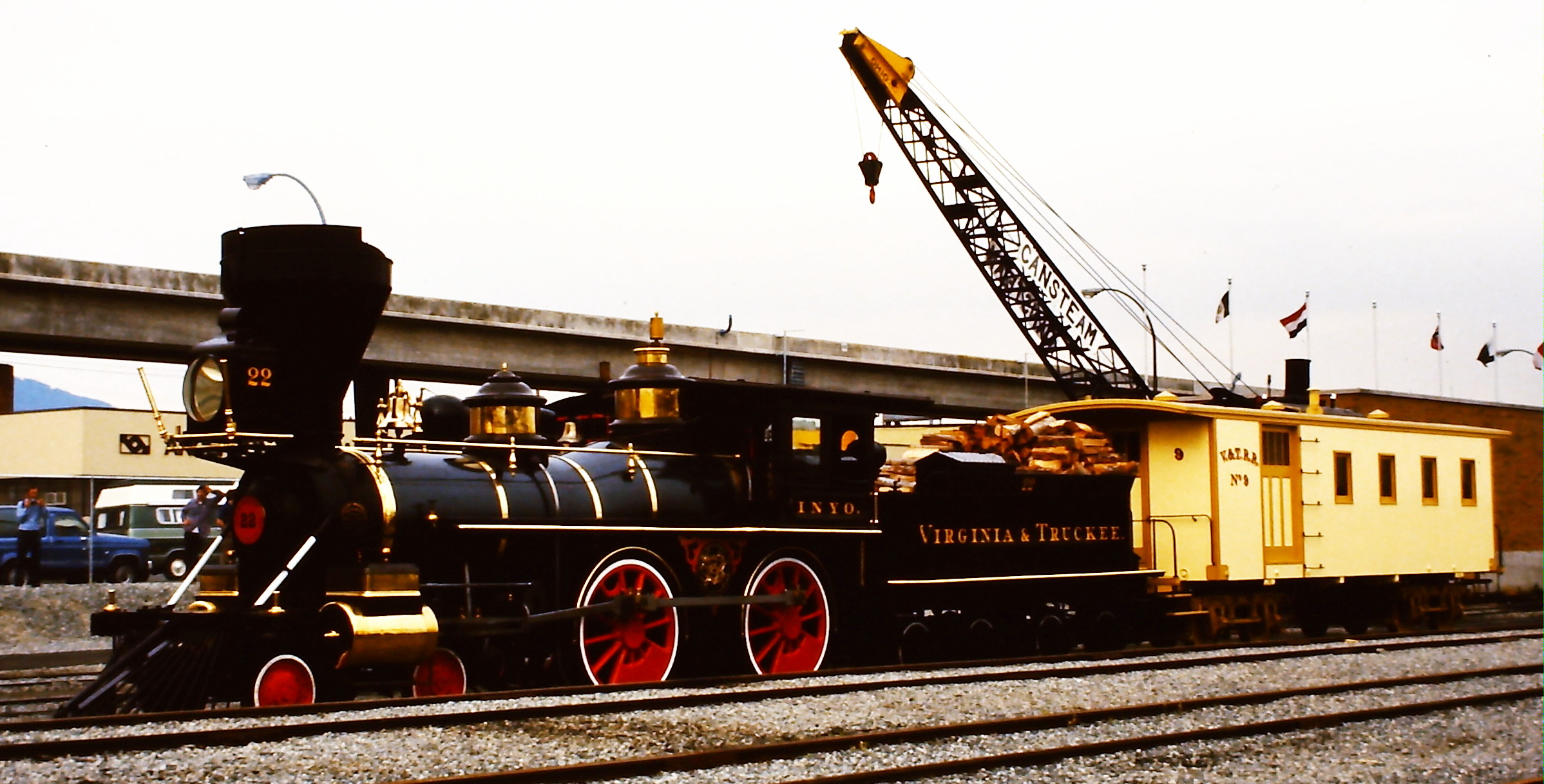 Virginia & Truckee Nummer 22 Inyo auf der SteamExpo 86